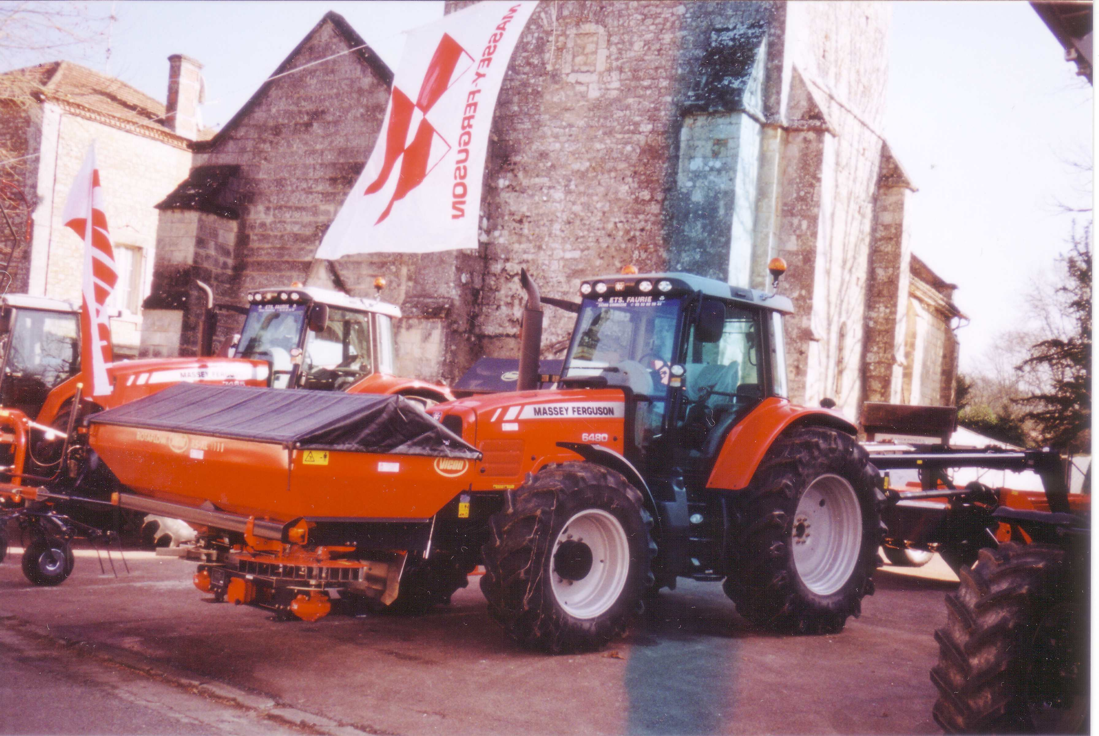 semoi - engrais, Vicon Rotaflow RS-XL & Massey Ferguson 6480